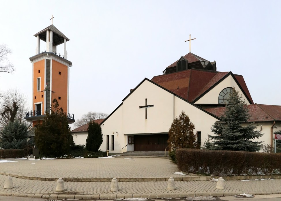 A főút felől